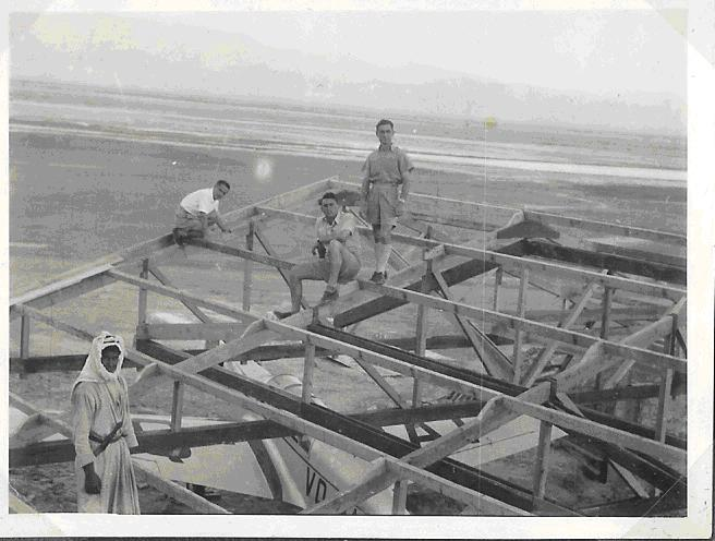 בנימין כהנא עומד על פיגומי האנגר שנבנה בסדום הנצורה. ברקע ניתן לראות מטוס זלין